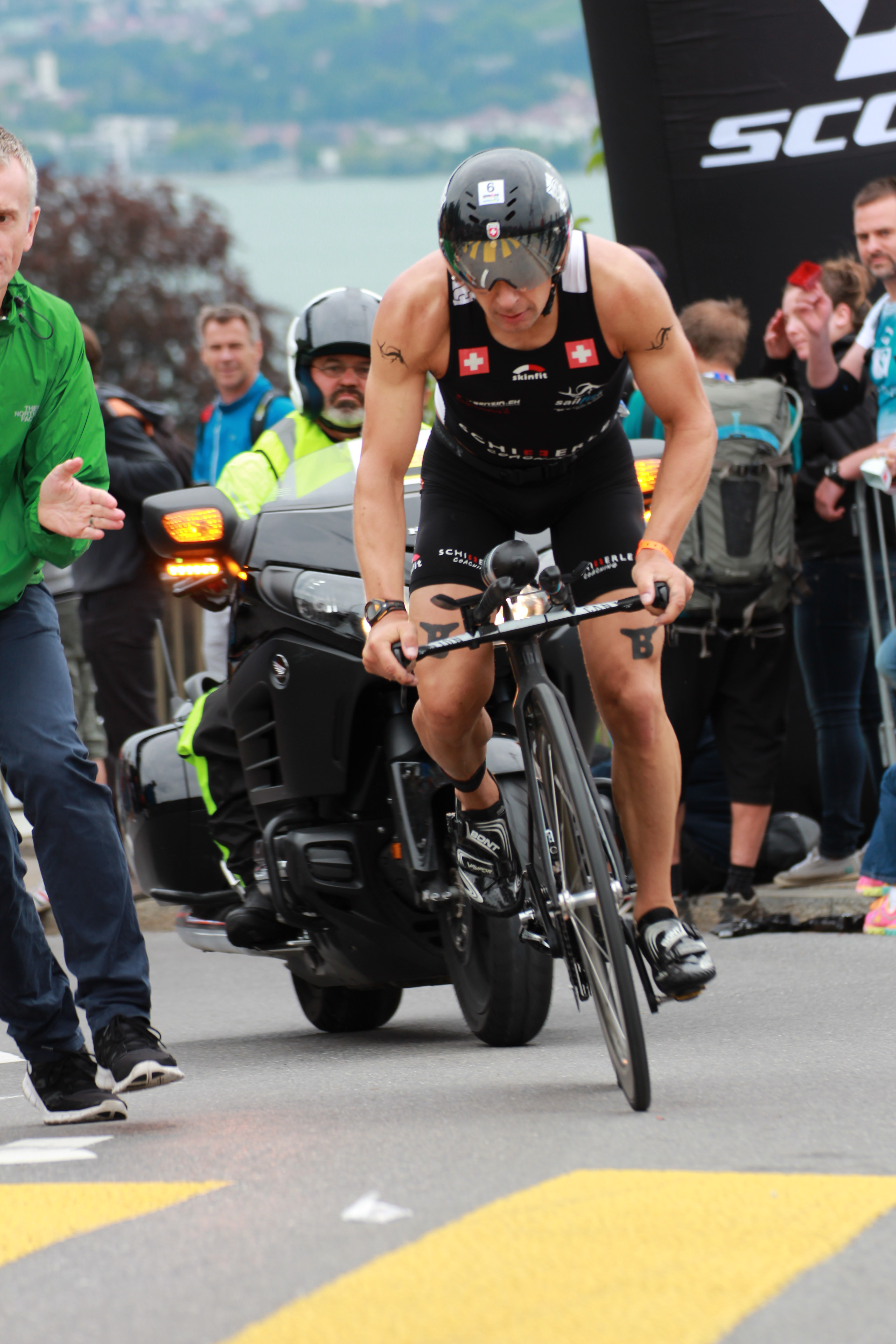 Mike Schifferle at Ironman Switzerland 2014.jpg